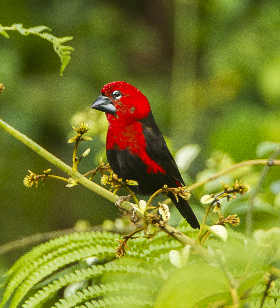 Black-bellied Seedcracker - Kakum - Ghana_S4E2847